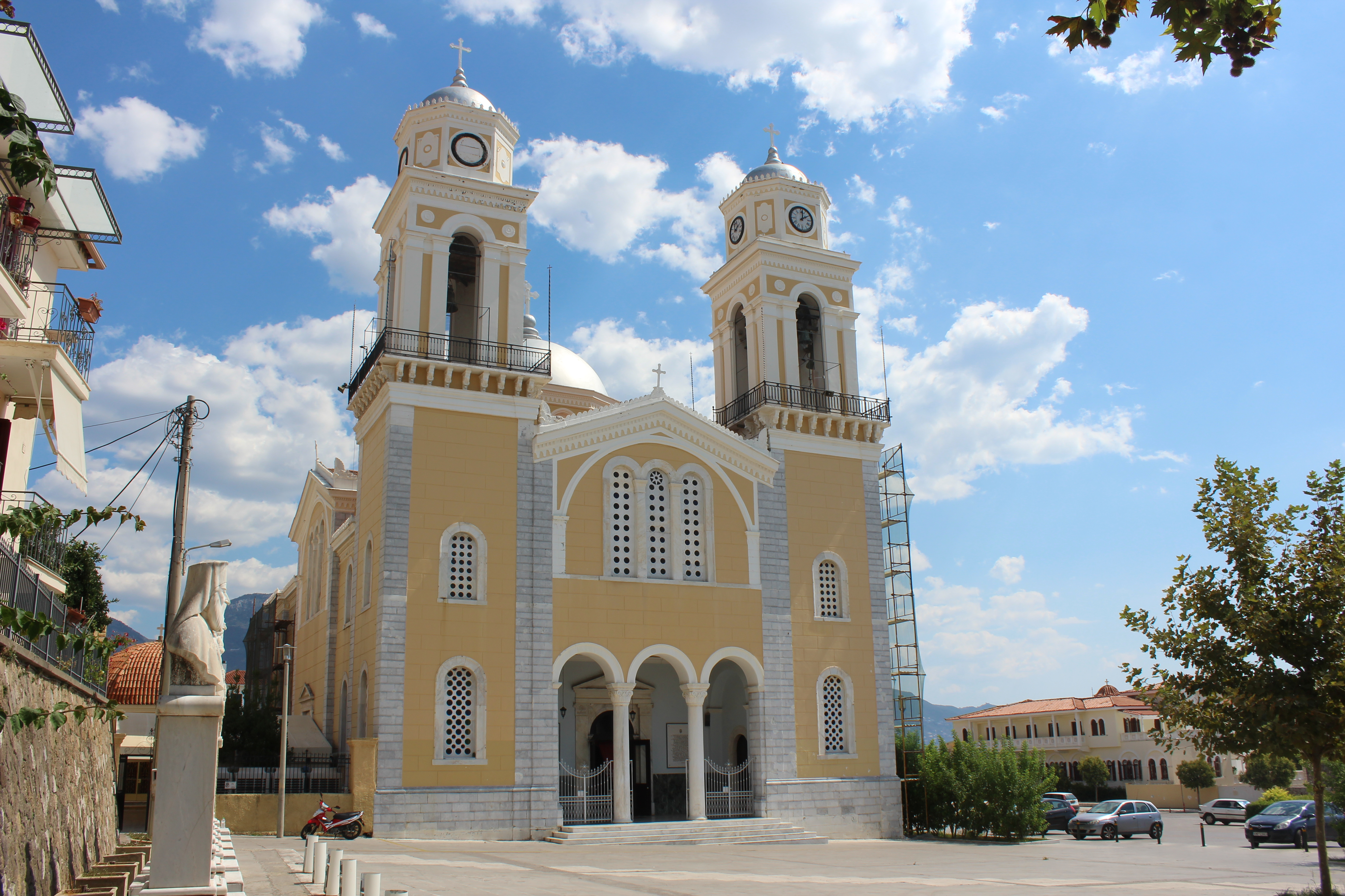 Μητροπολιτικός ναός Υπαπαντής, Καλαμάτα«Μητροπολιτικός ναός Υπαπαντής, Καλαμάτα»